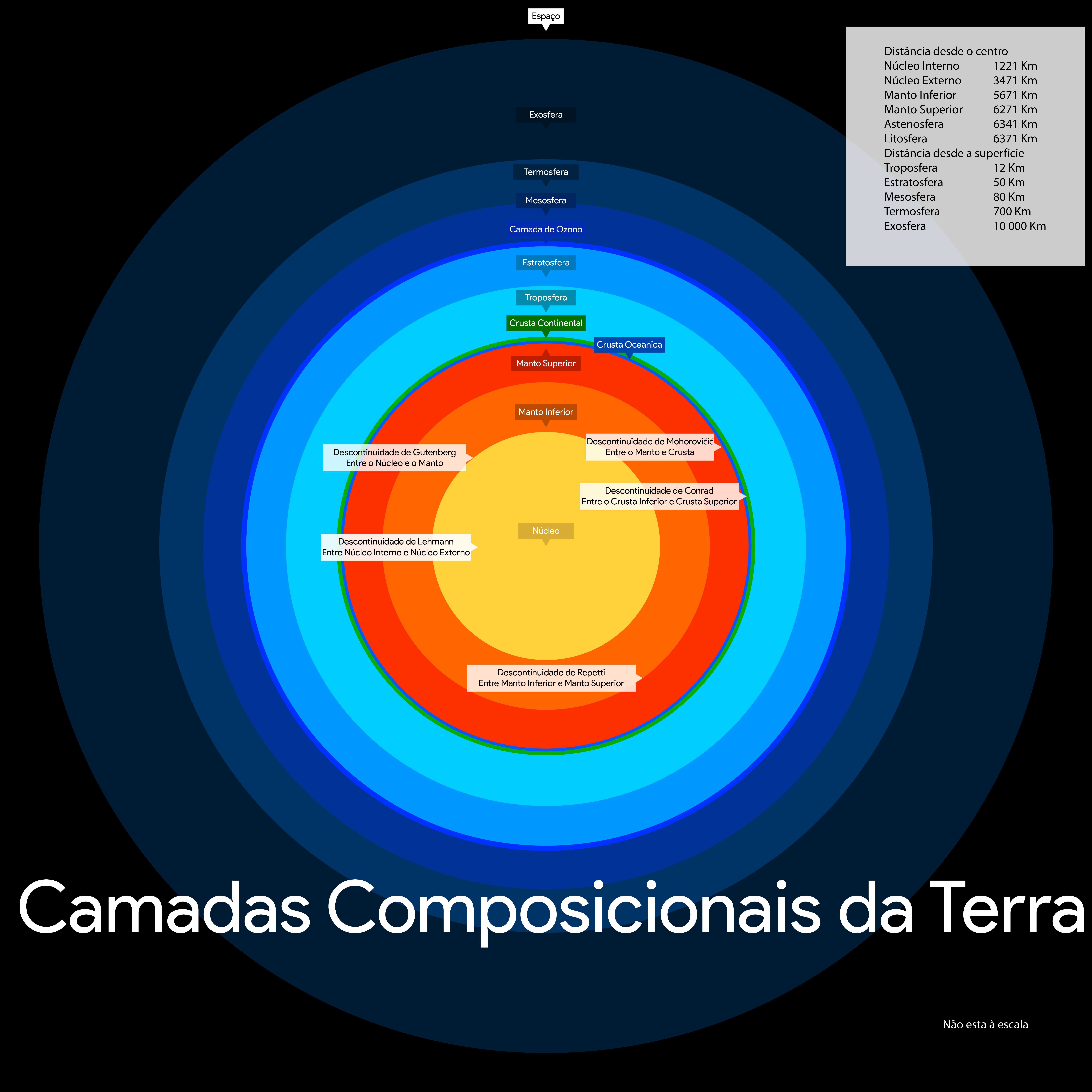 Camadas Composicionais da Terra (não está à escala) e os seus tamanhos